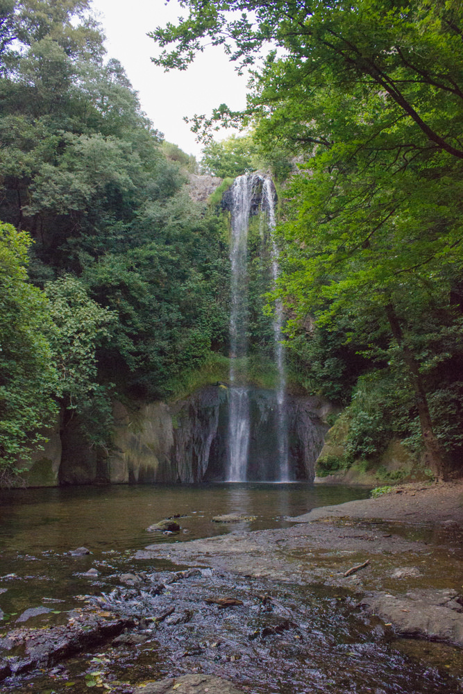 Cascata di Castel Giuliano, Bracciano